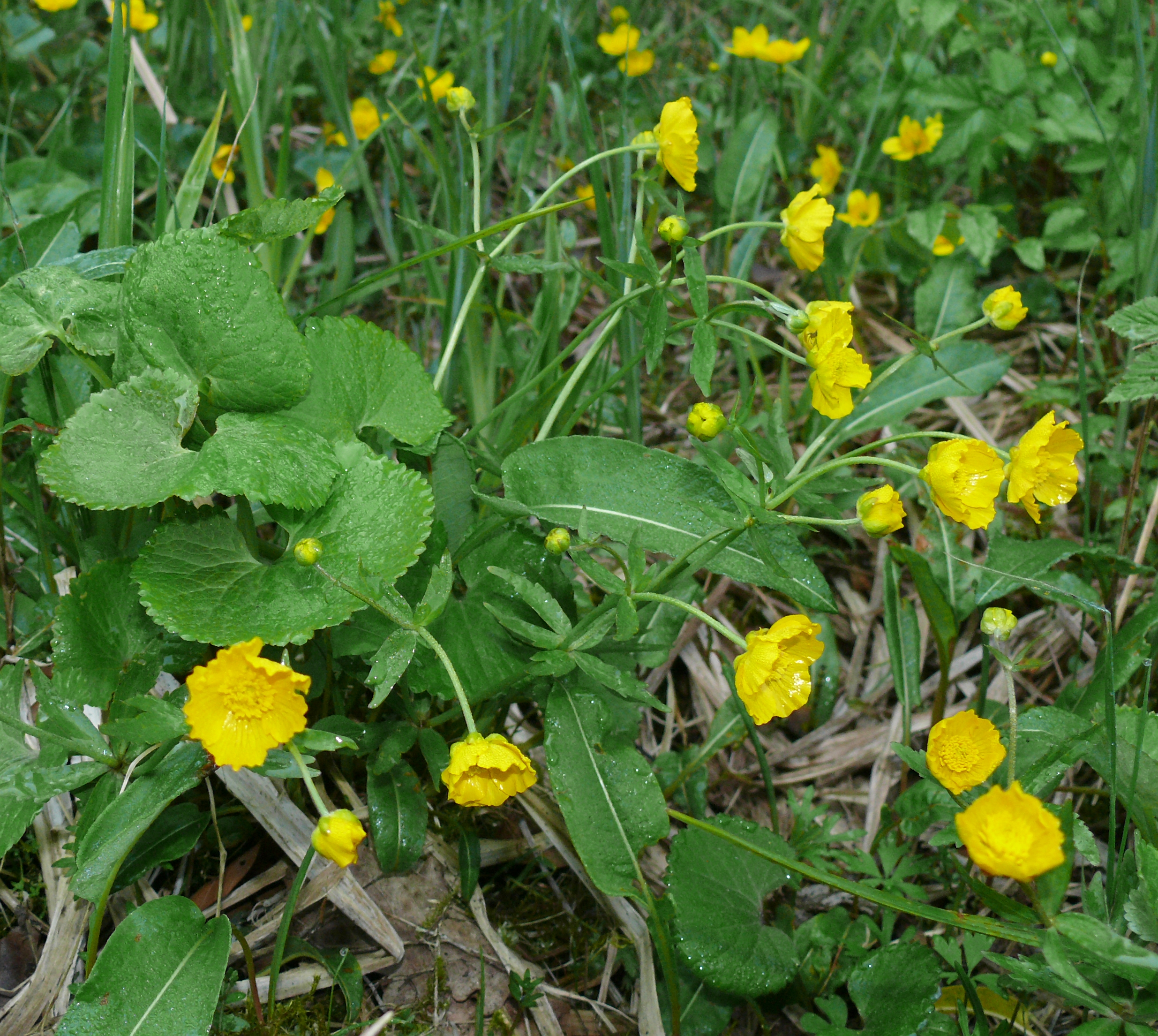 Ranunculus cassubicifoliusDeutschland - Schwäbisch-Fränkischer Wald